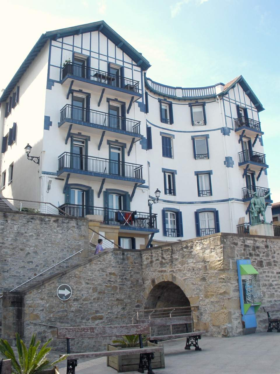 Getaria (Gipúzkoa)